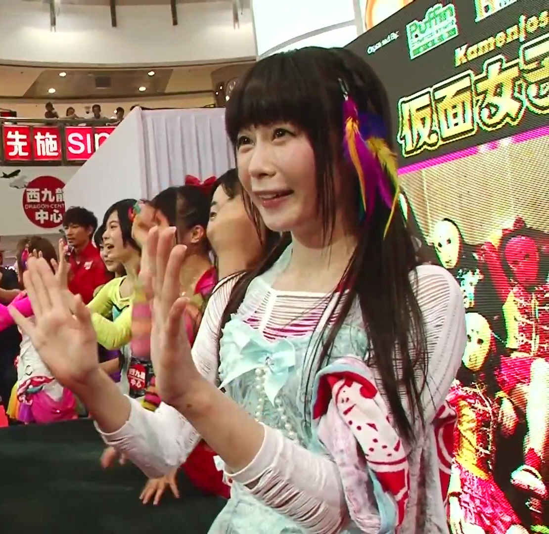 中文（香港）: 仮面女子香港見面會 @ 西九龍中心